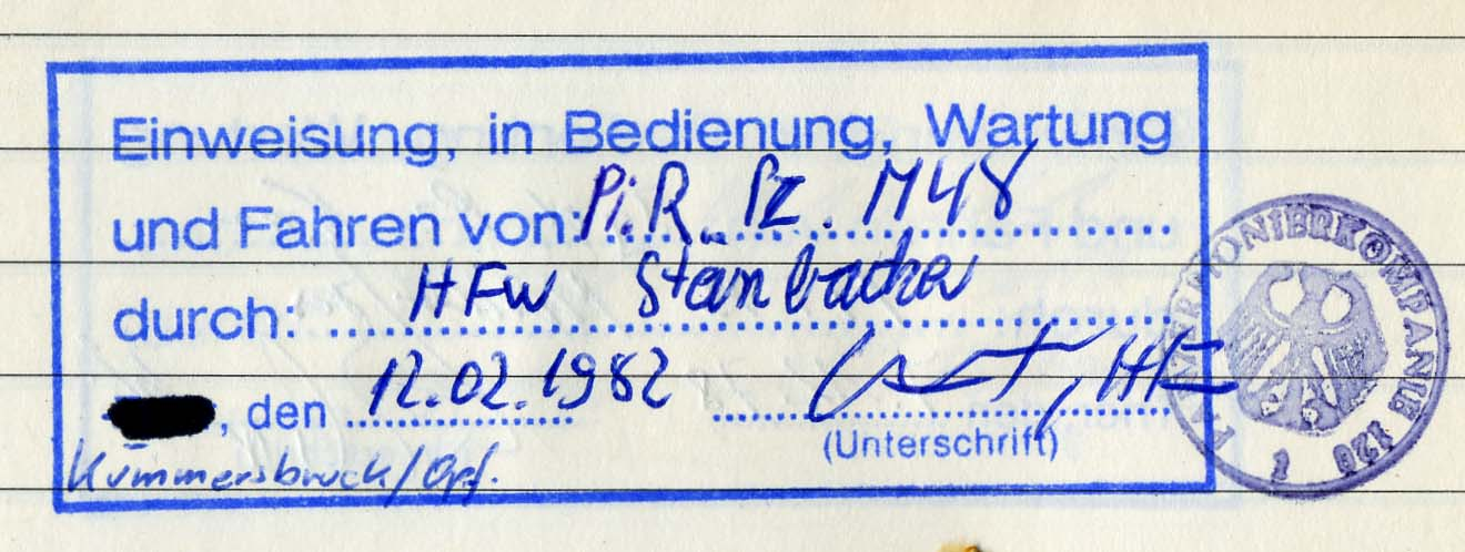 Einweisungsnachweissstempel PiRPz M48